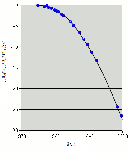 النظام النجمي الثنائي PSR 1913+16 يفقد الطاقة بسبب إشعاع الموجة الثقالية.